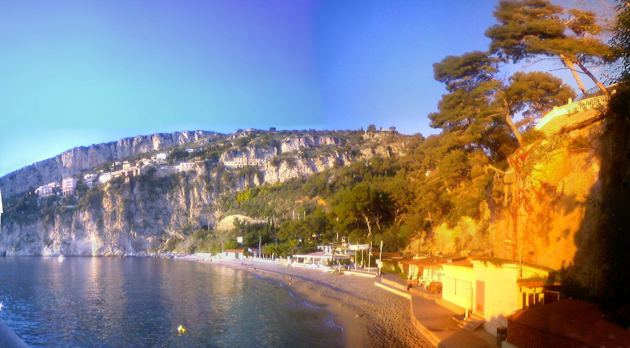 Une des plages de la Mala vue du sentier littoral. Cap D'ail, Alpes Maritimes (06). Assemblage de 15 photos de téléphone avec le logiciel libre Hugin, retravaillé sous Gimp.